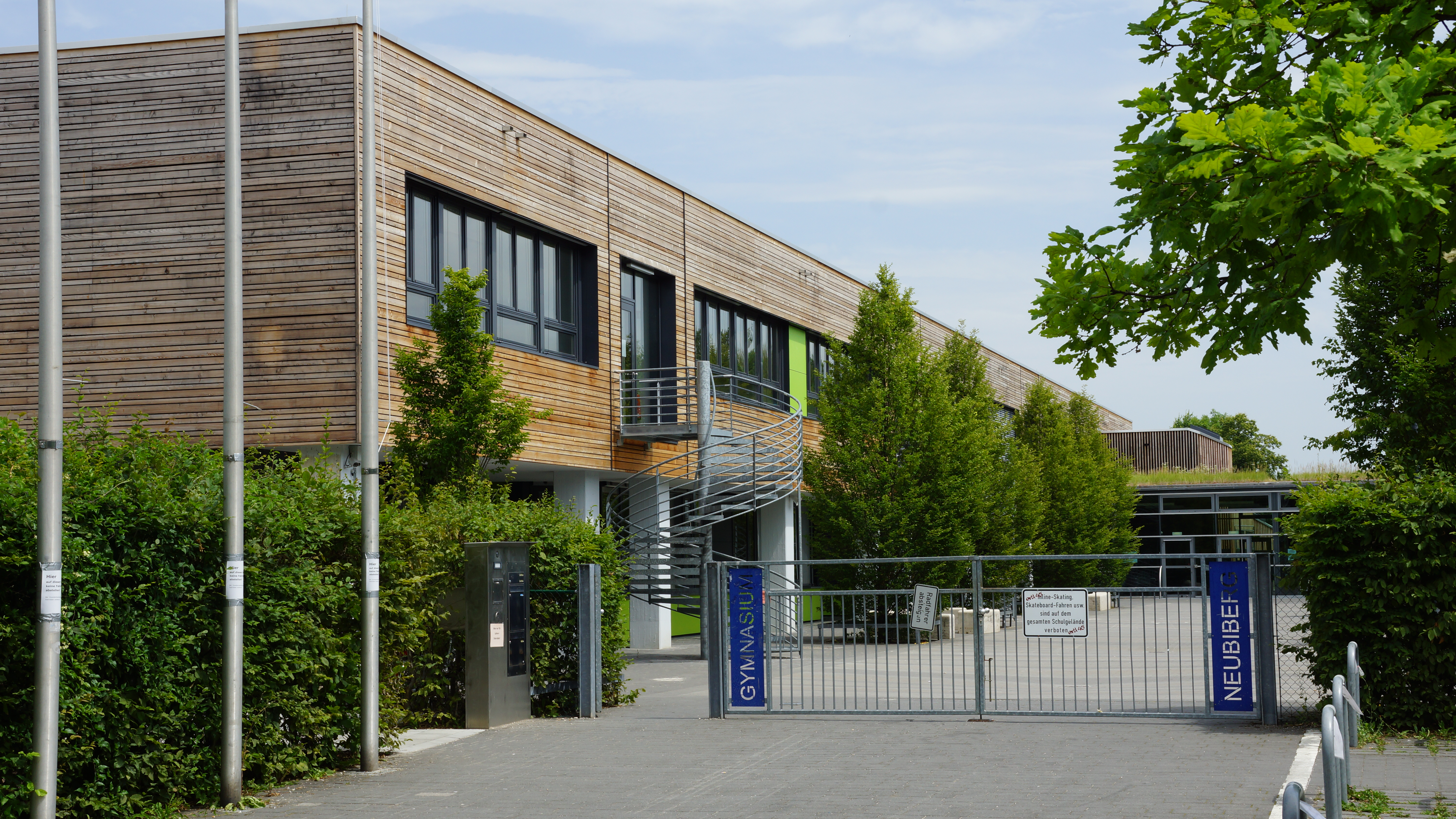 Gymnasium Neubiberg, Bayern, Deutschland. Die Aufnahme zeigt den Hauptzugang an der Cramer-Klett-Straße.